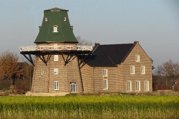 Mühlenneubau in Wegberg-Felderhof